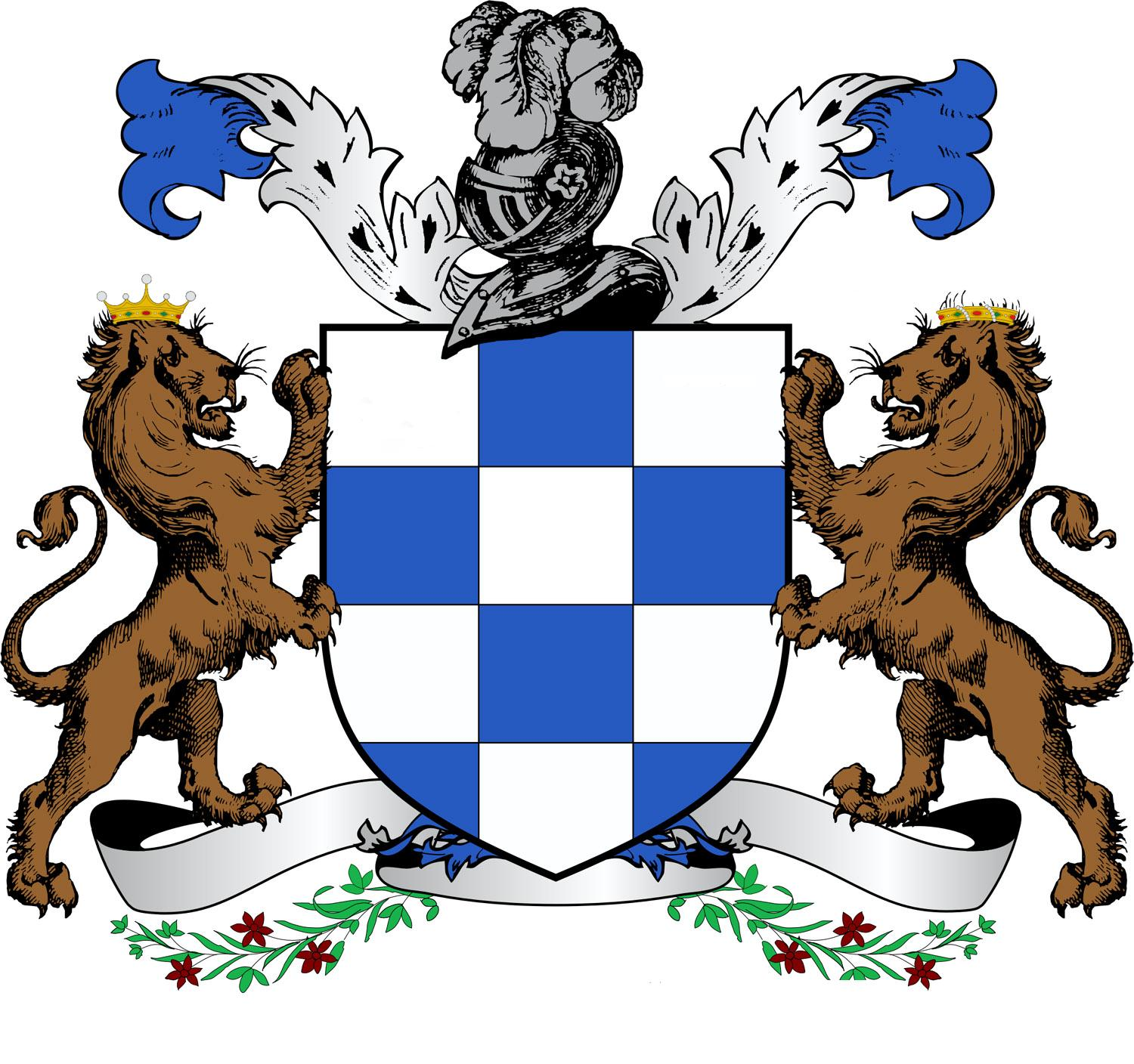 Escudo heráldico de la familia Fernández Bascarán, Vizcondes de San Claudio y Señores de Olvera